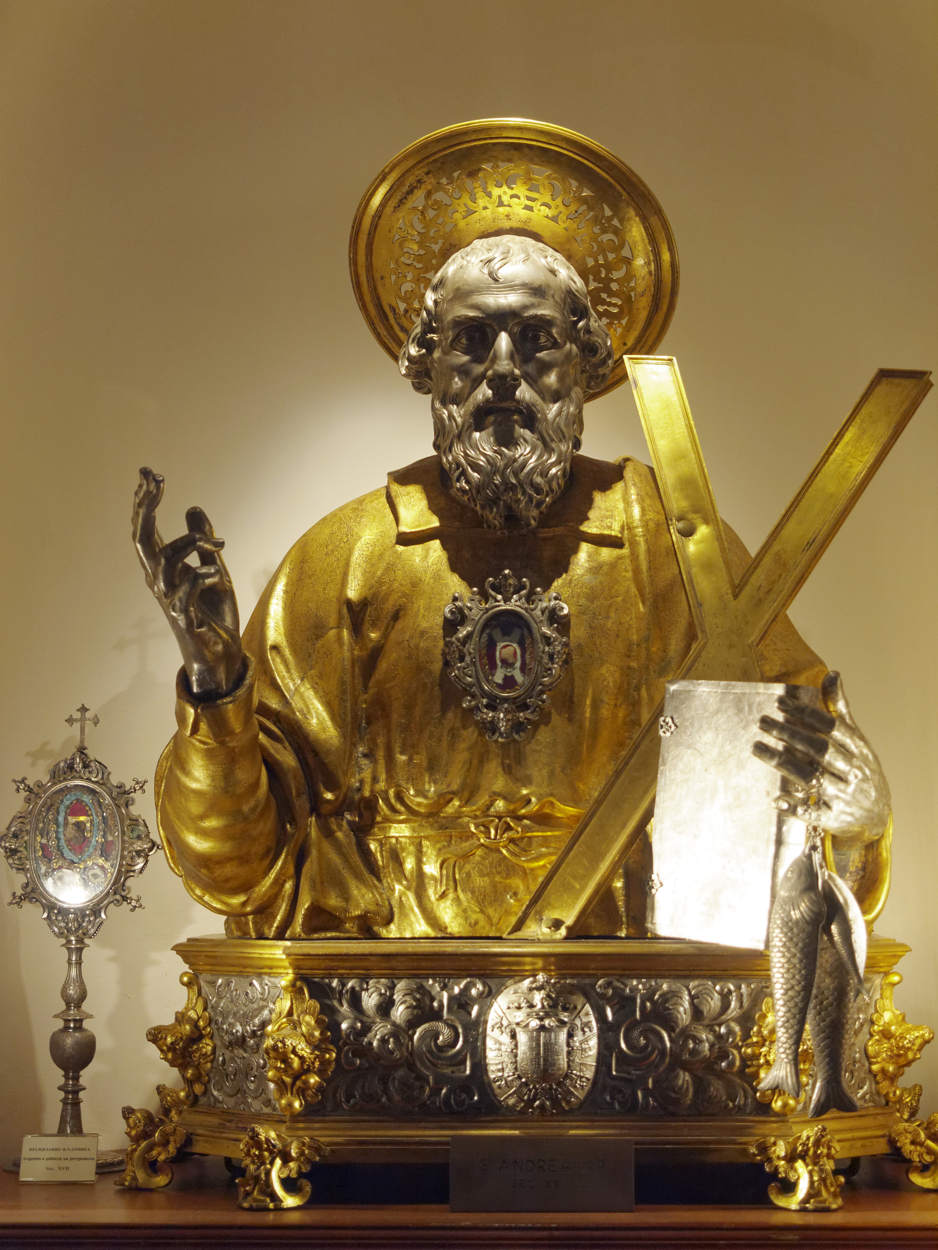 Reliquienschrein St. Andreas in einer Nische an der südlichen Wand im Dom von Amalfi, Kampanien, Italien